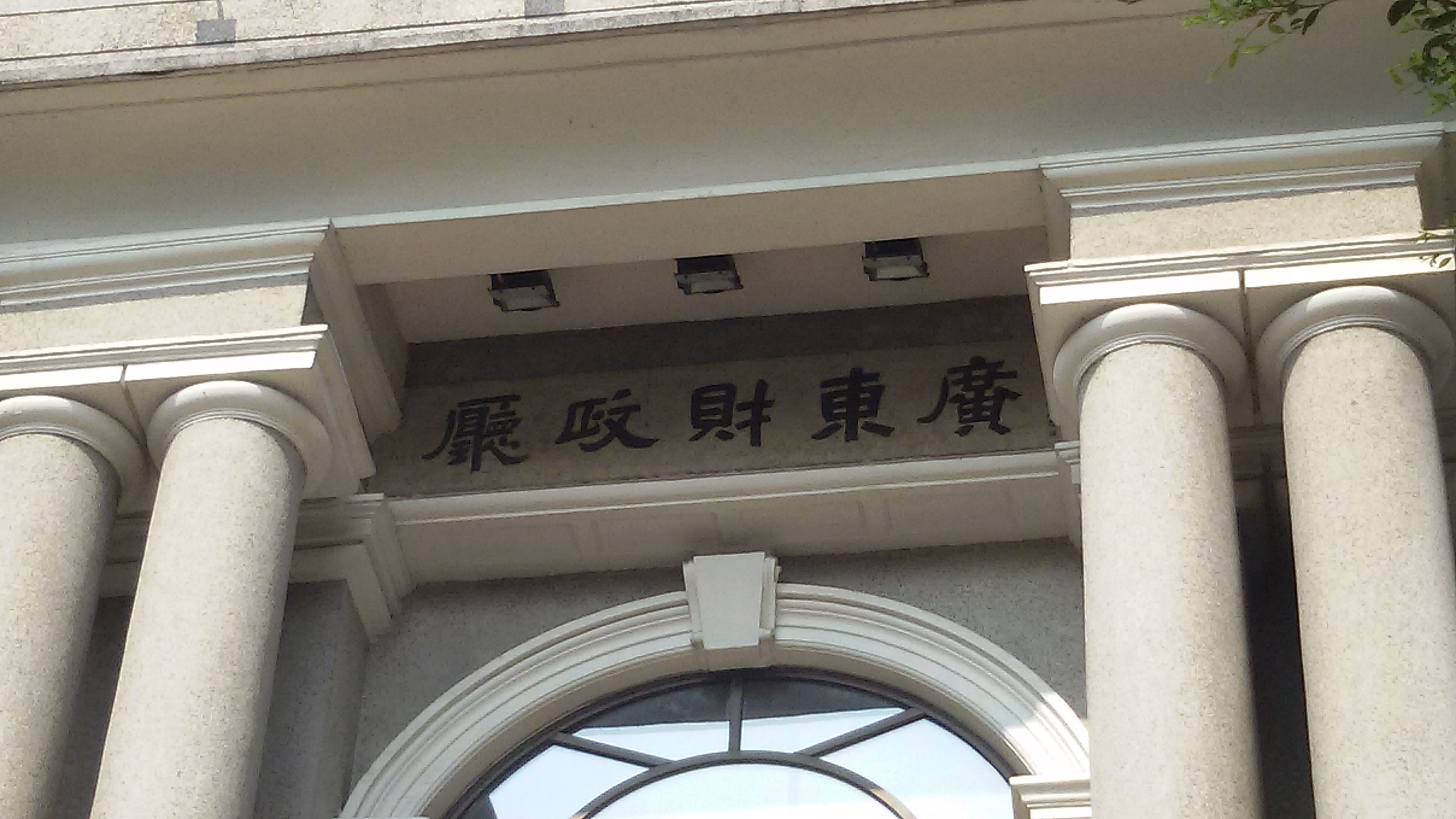 粵語: 廣東財政㕔正門，嚿牌上邊啲字。